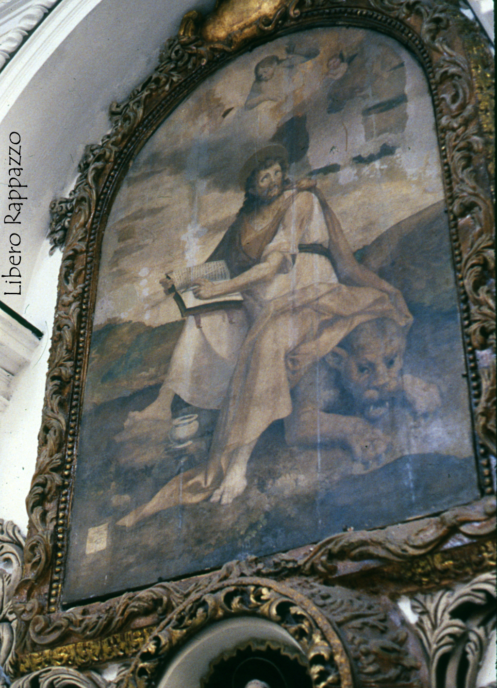 Tela di San Marco, Deodato Guinaccia, 1581, Basilica Cattedrale, Santa Lucia del Mela